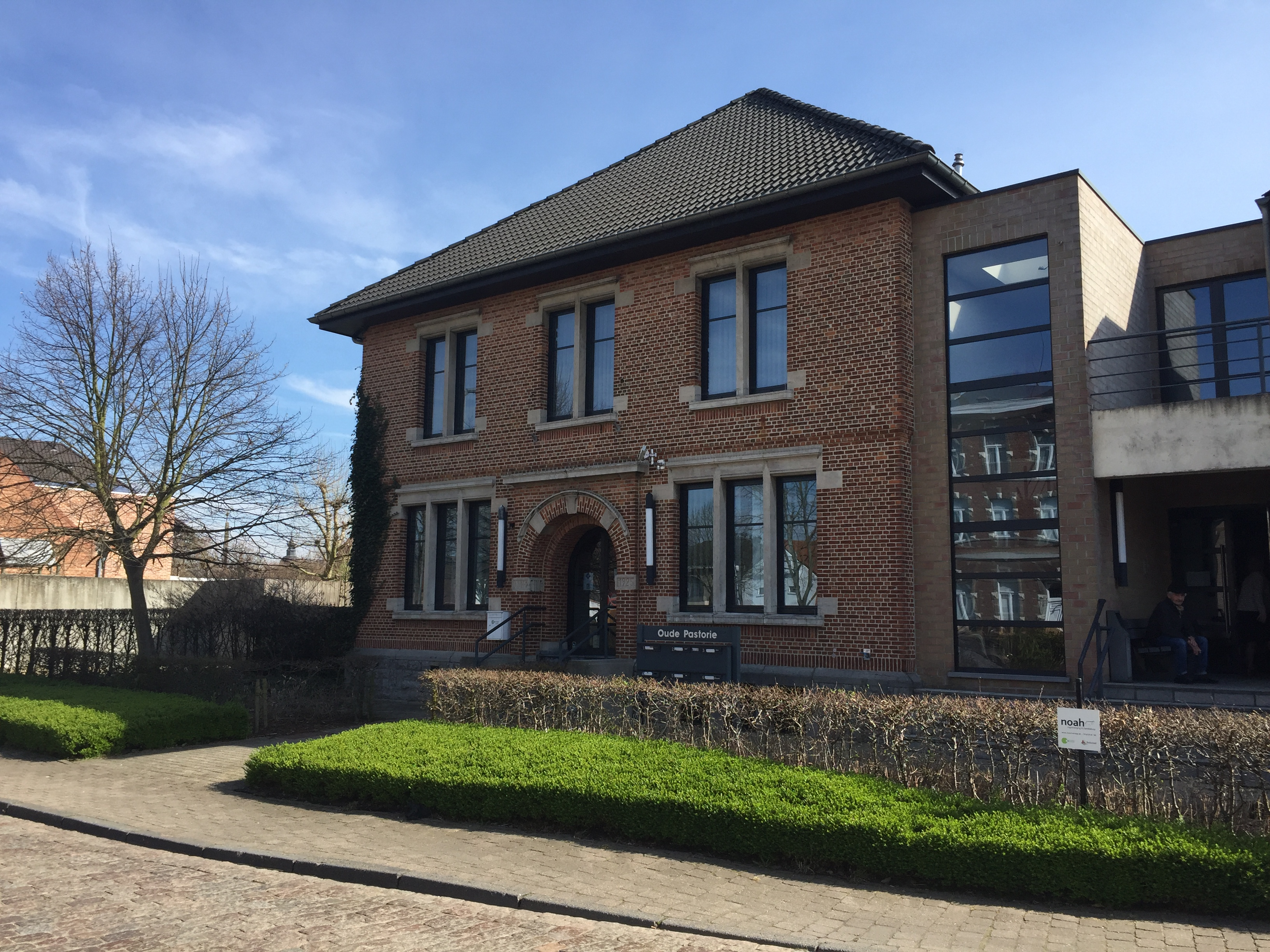 Dit was de vroegere woning van de pastoor